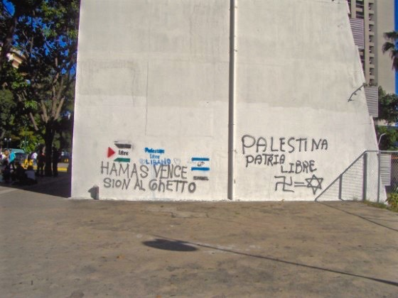 Pintada antisemita aparecida en la capital venezolana de Caracas en enero del 2009